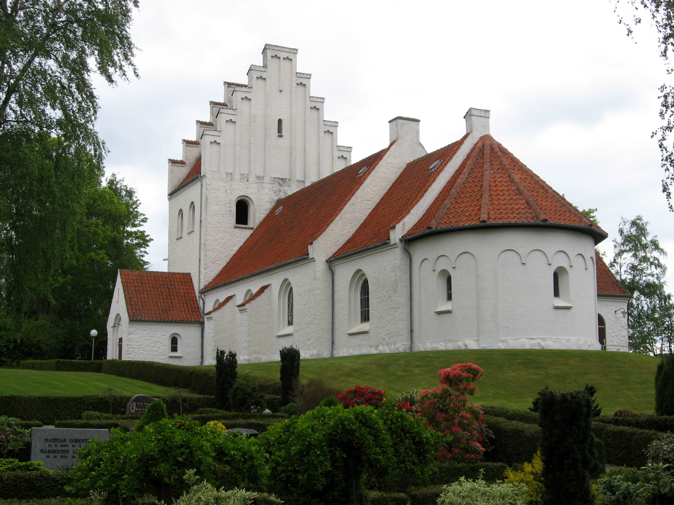 Stenvad Kirke in Stenvad Sogn, Nørre Djurs Kommune, Denmark. Viewed from southeast.